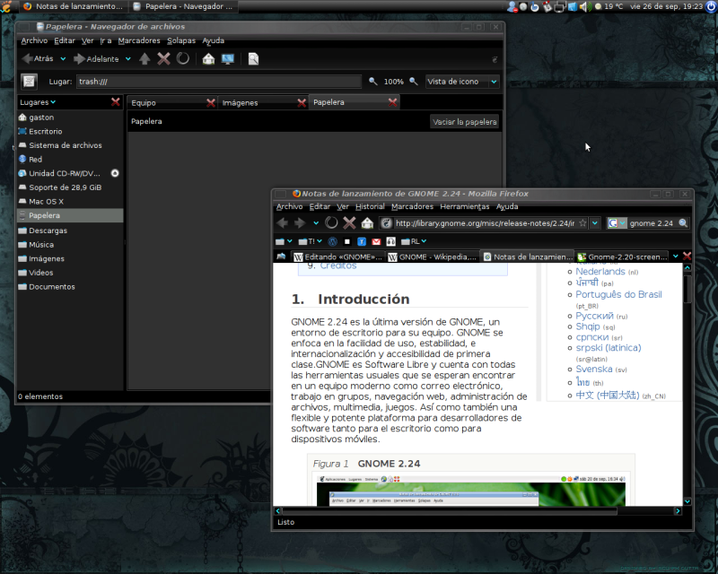 Entorno de escritorio Gnome 2.24 ccon un skin negro.